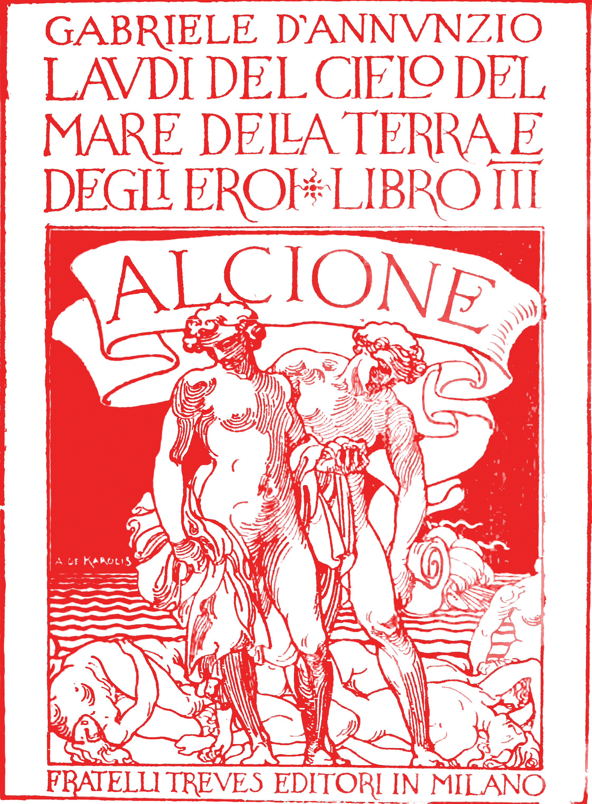 Raccolta di poesie di Gabriele D'Annunzio. libro 1. Maia. 1912. -libro 2. Elettra. 1912. -libro 3. Alcione. 1908. -libro 4. Merope. 2. ed. 1912